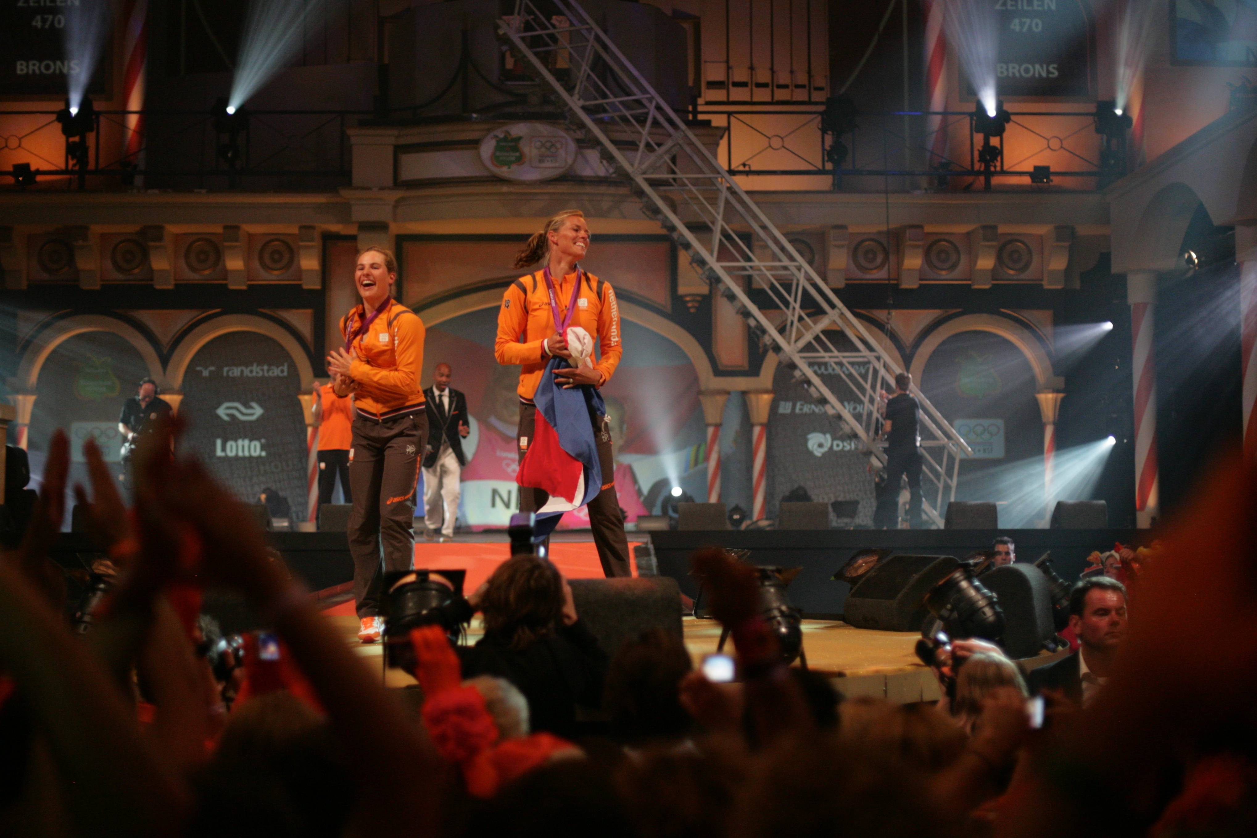 Lobke Berkhout & Lisa Westerhof @ Holland Heineken House